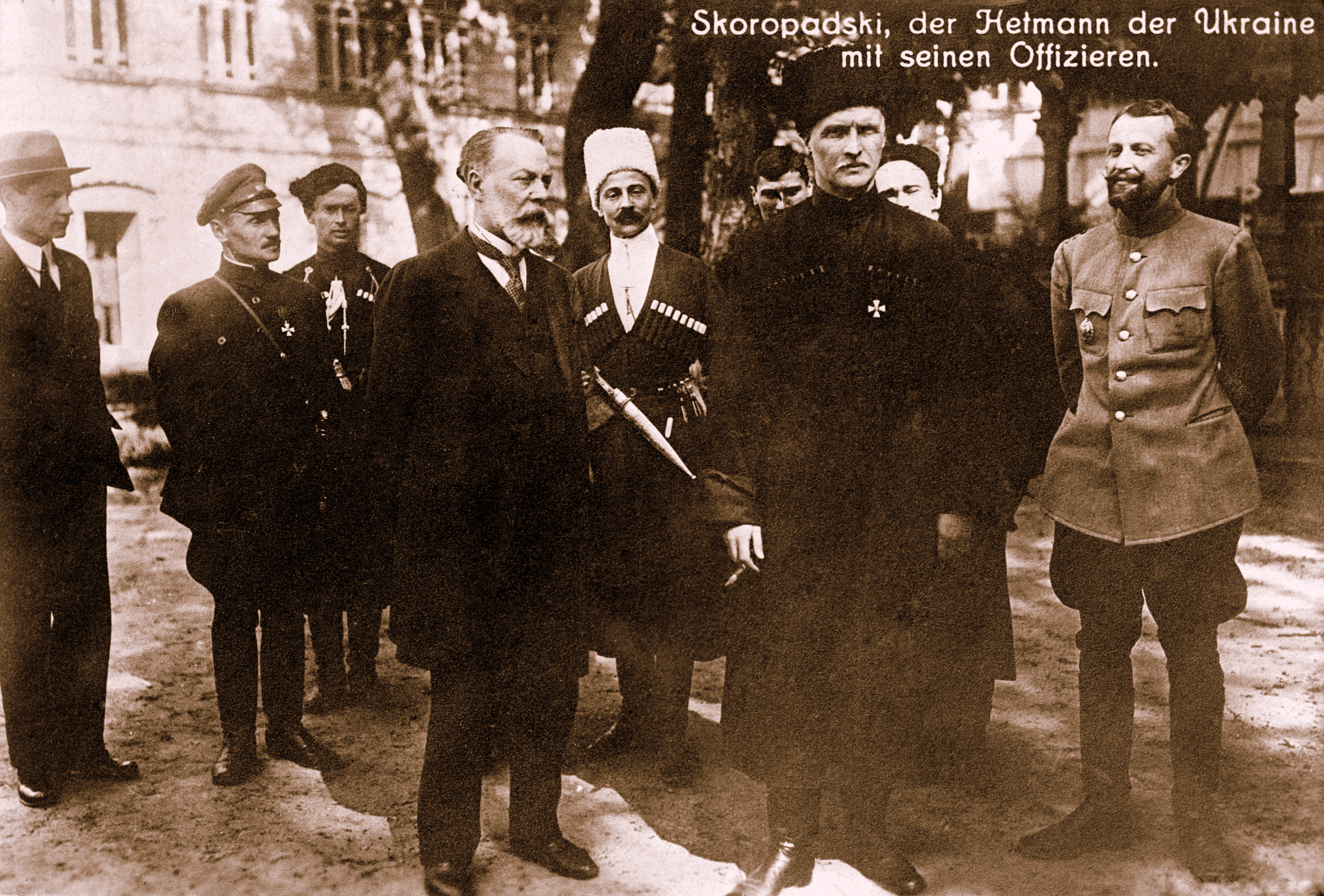 гетьман Скоропадський зі своїми офіцерами. Стоїть другим зліва - генерал-хорунджій К. Прісовський: гетьман Скоропадський зі своїми офіцерами. Стоїть другим зліва - генерал-хорунджій К. Прісовський